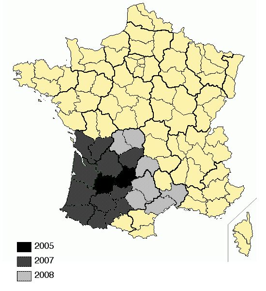 évolution de la répartition de Vespa velutina d’après les données de l'INPN ( sur une carte wikicommons